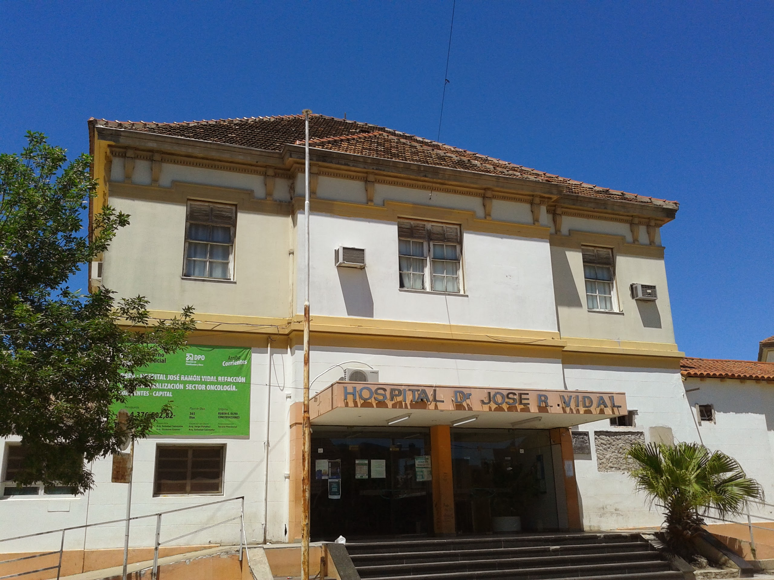 Necochea 1050